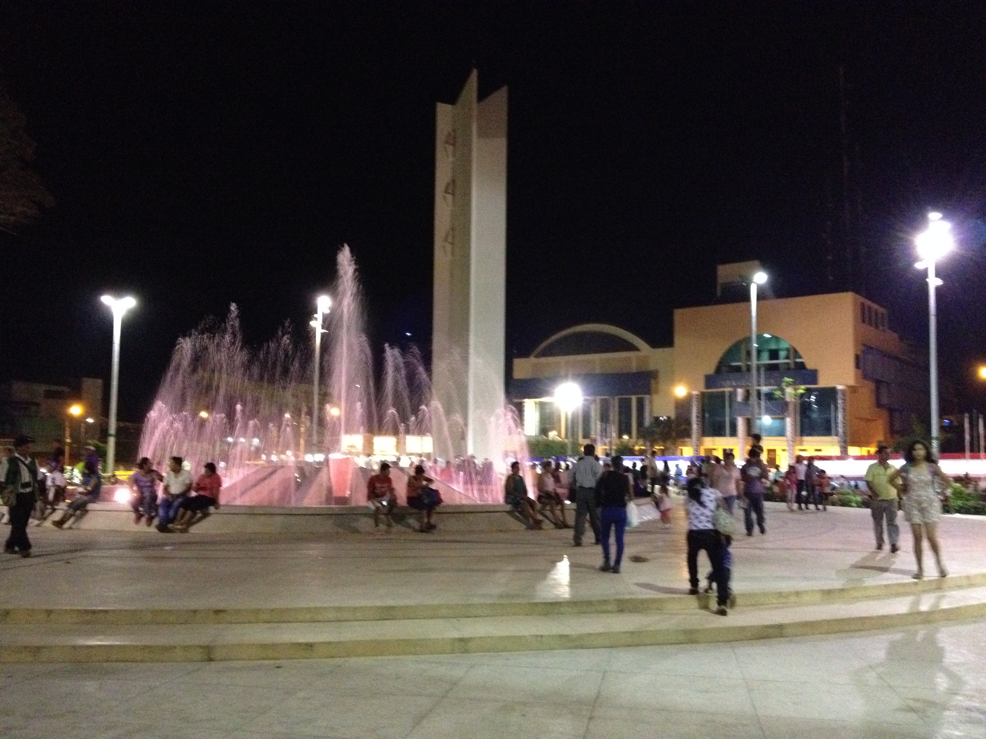 La pileta de la plaza de armas vista de noche. Se ve también la municipalidad y la catedral al frente de la imagen.